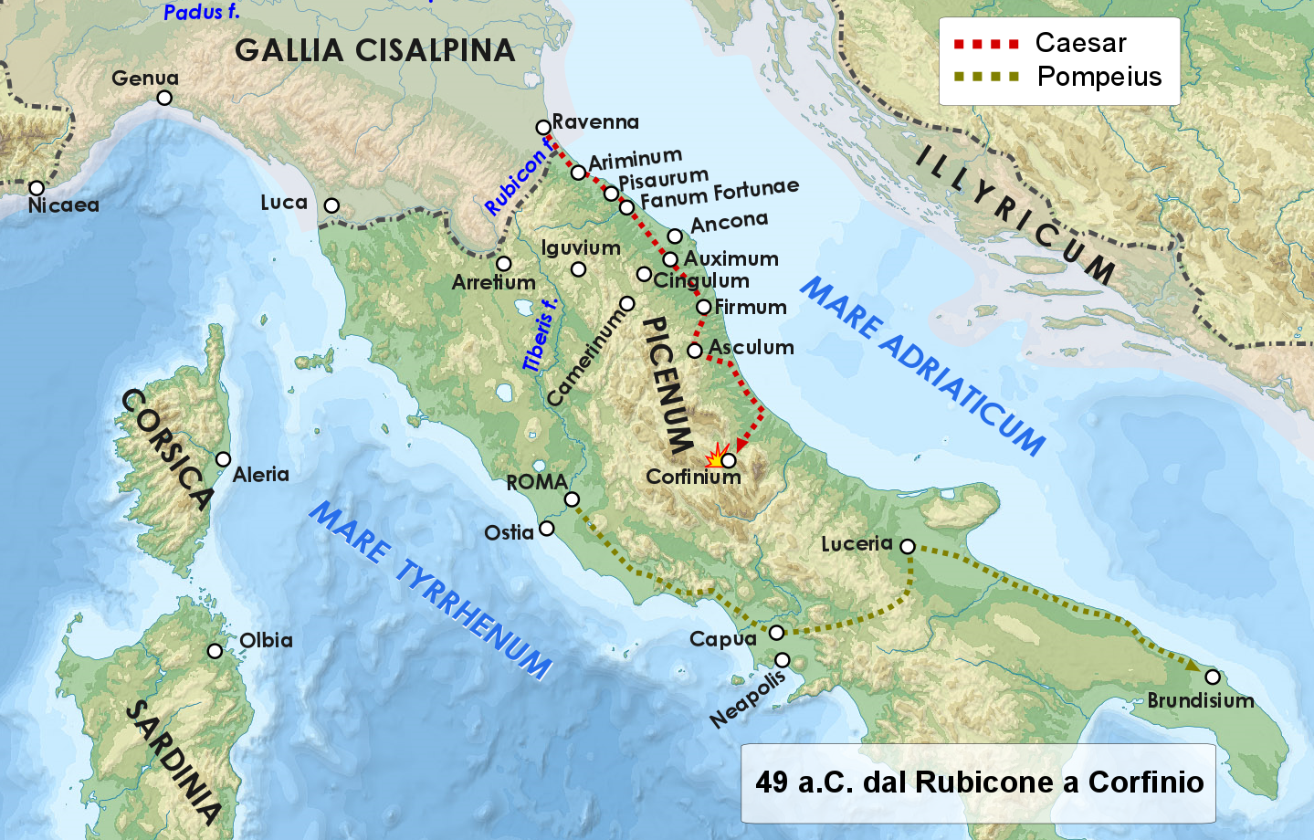 Inizio della guerra civile tra Cesare e gli ottimati (Pompeo, Catone, Marcello, ecc.) - 49 a.C. Da Ravenna a Corfinio